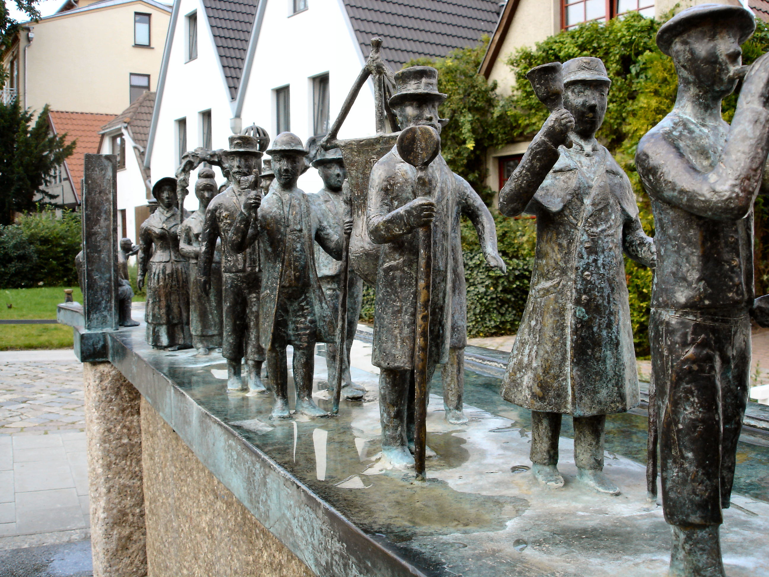 Detail „Warnminner Ümgang“ (2004), Brunnenplastik von Wolfgang Friedrich in Warnemünde